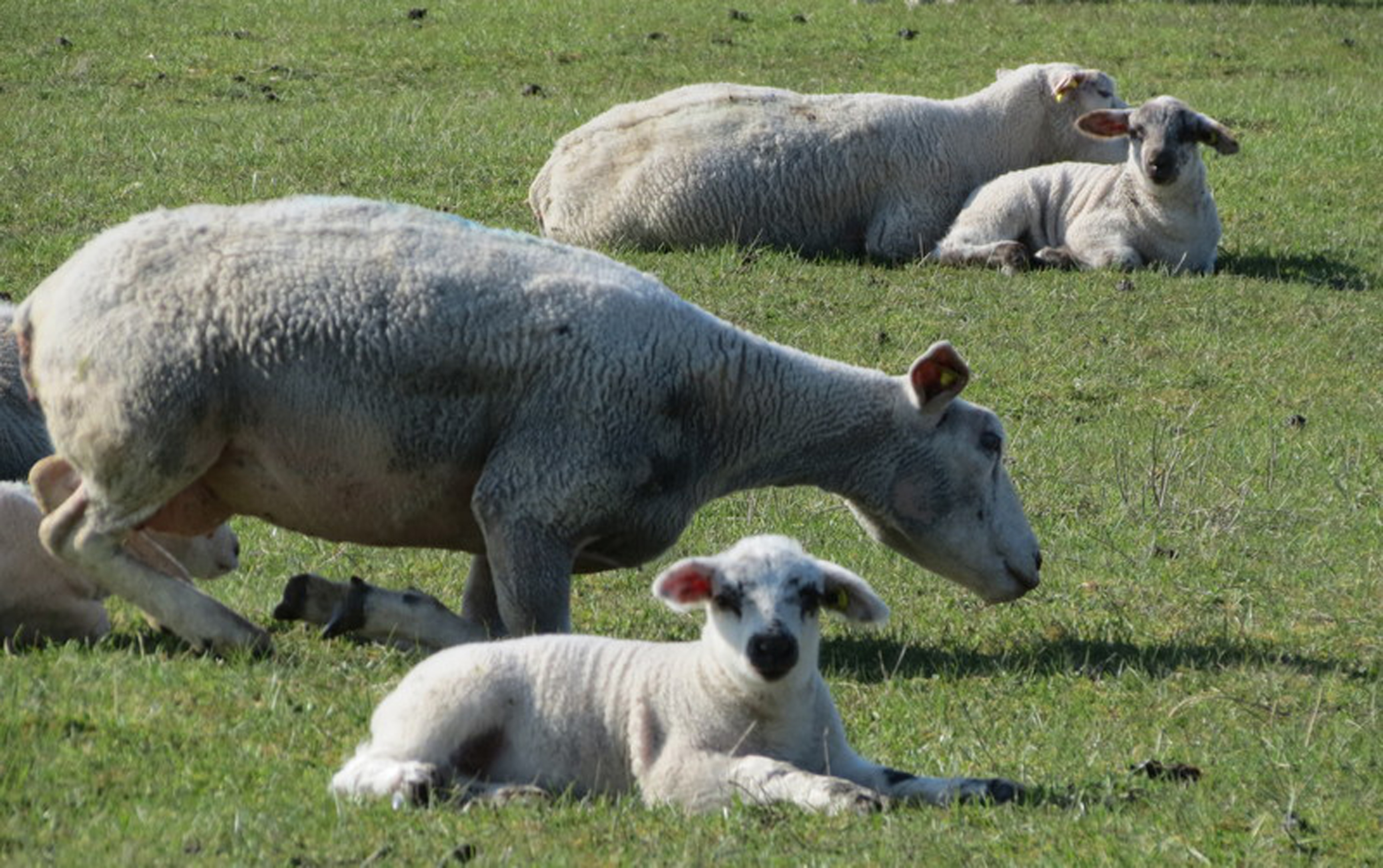 Brebis et agneaux de Lozère